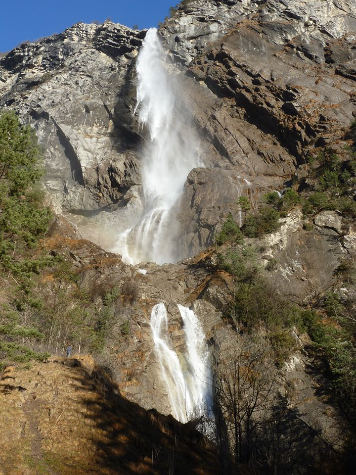 Cascade qui appartient à la commune de Sallanches.